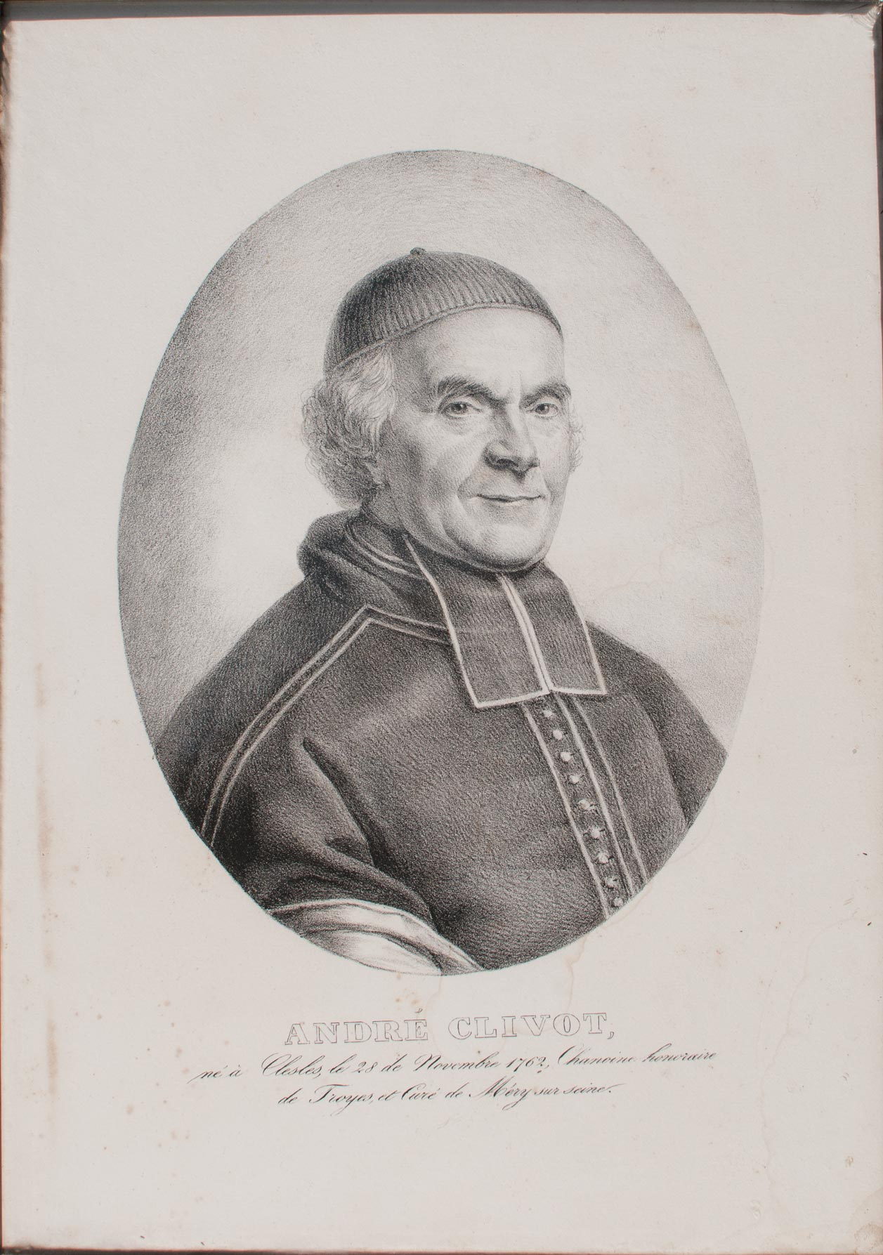 Gravure de l'abbé André Clivot texte:"né à Clesles, le 28 de Novembre 1762, Chanoine honoraire de Troyes, et Curé de Méry sur seine."